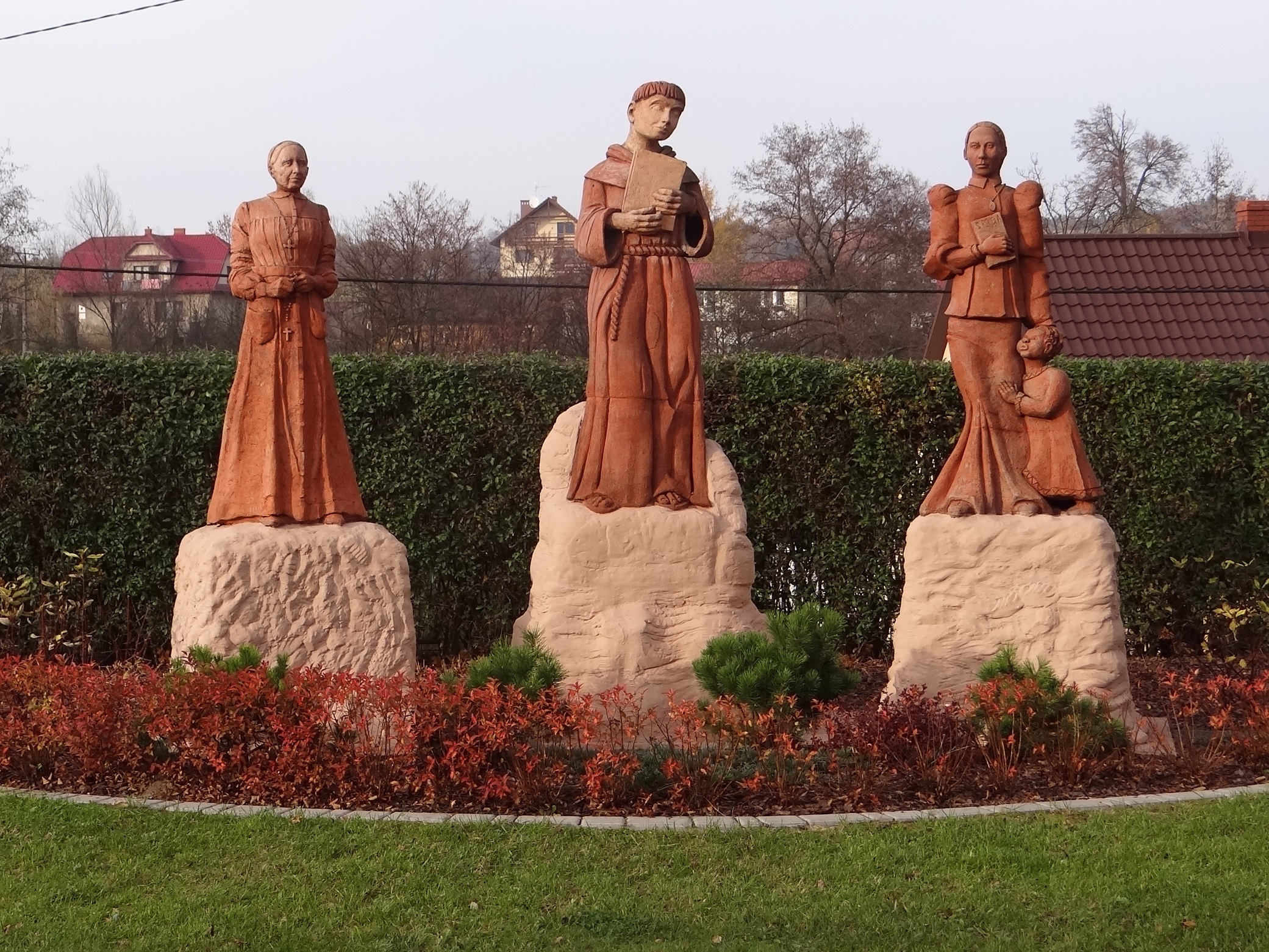 Św. Urszula Ledóchowska, św. Szymon z Lipnicy i bł. Maria Teresa Ledóchowska. Posągi w Lipnicy Murowanej